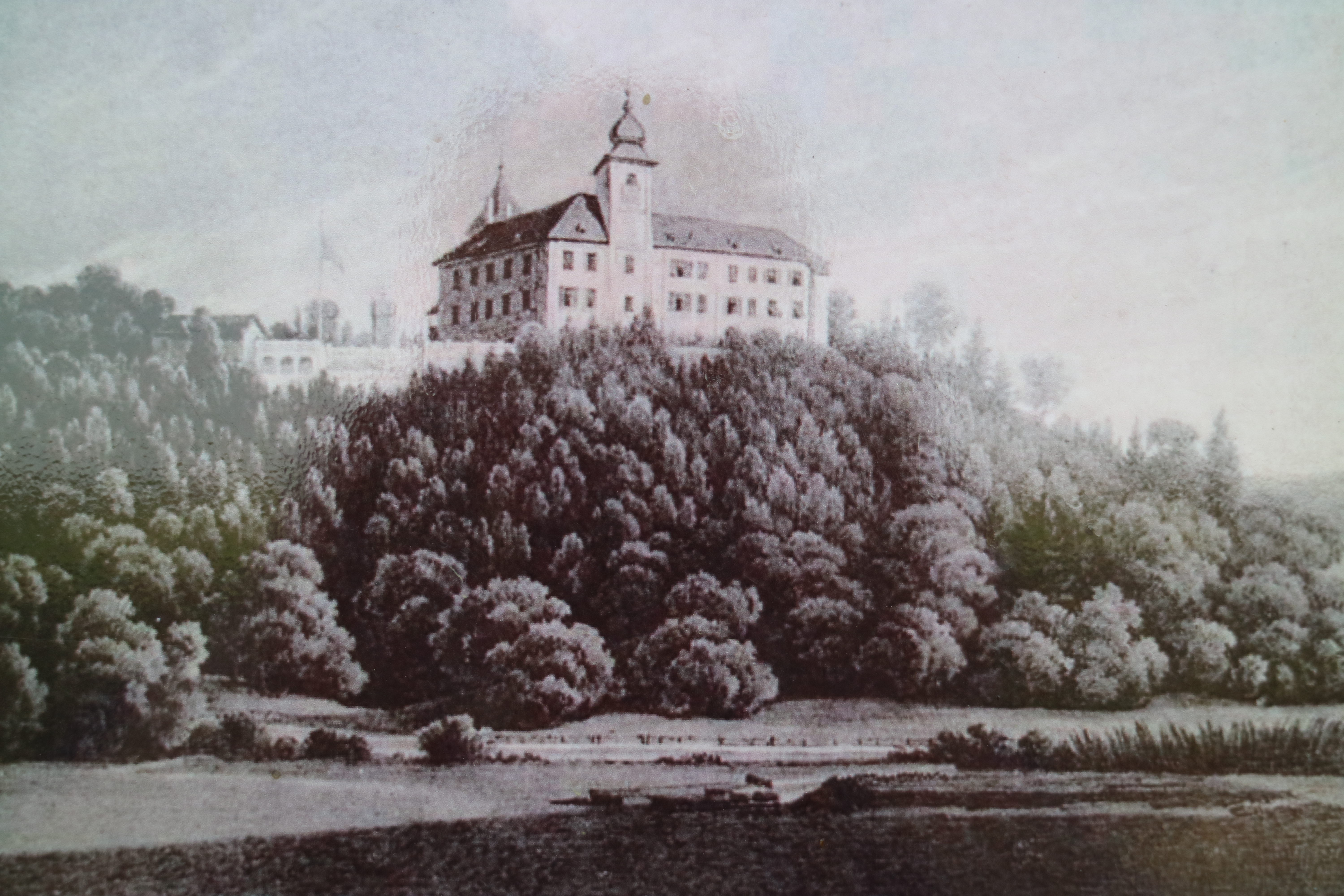 Ansicht von Schloss Weissenegg im 19. Jahrhundert